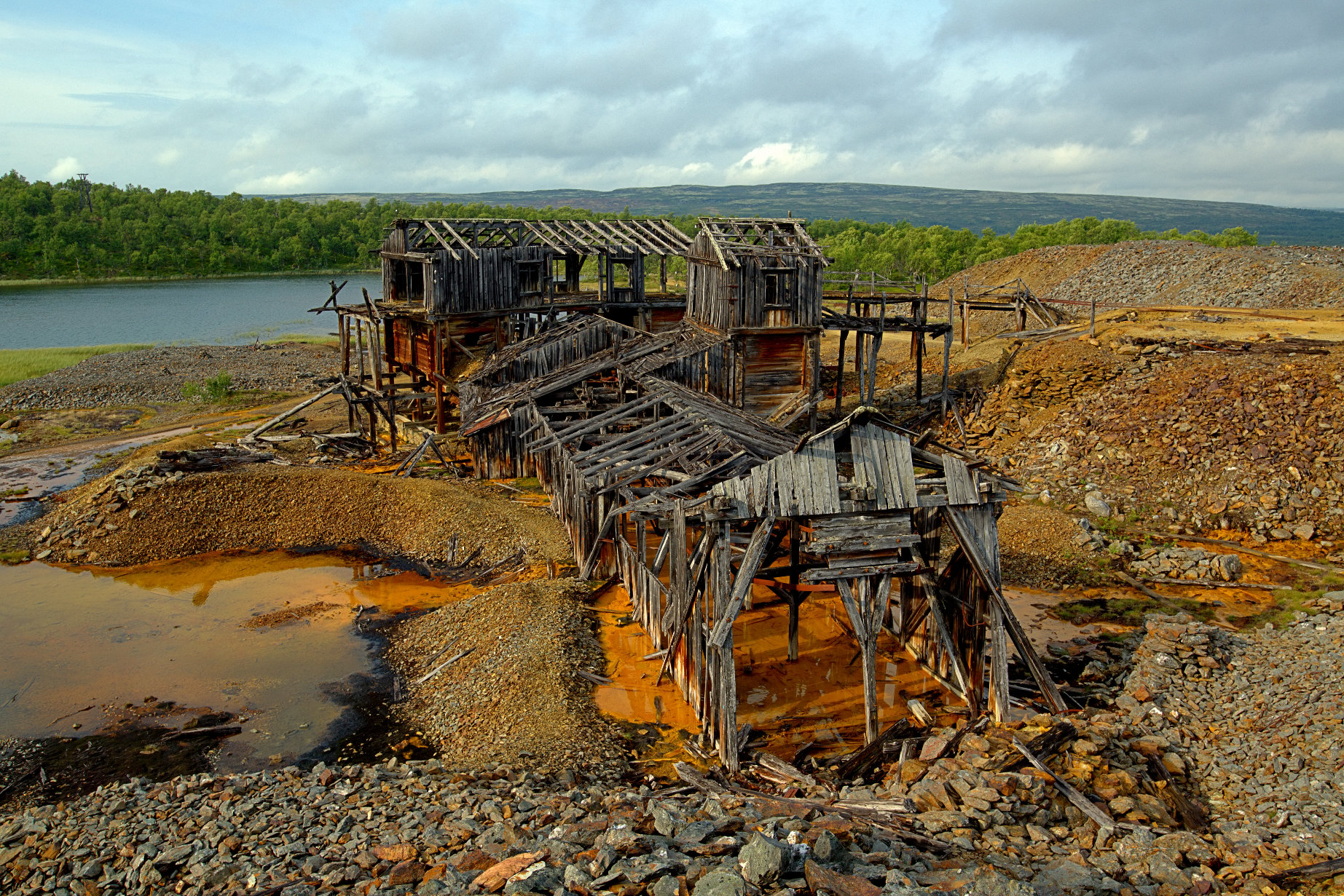 Vaskeverket ved Christianus Sextus-gruven på Røros